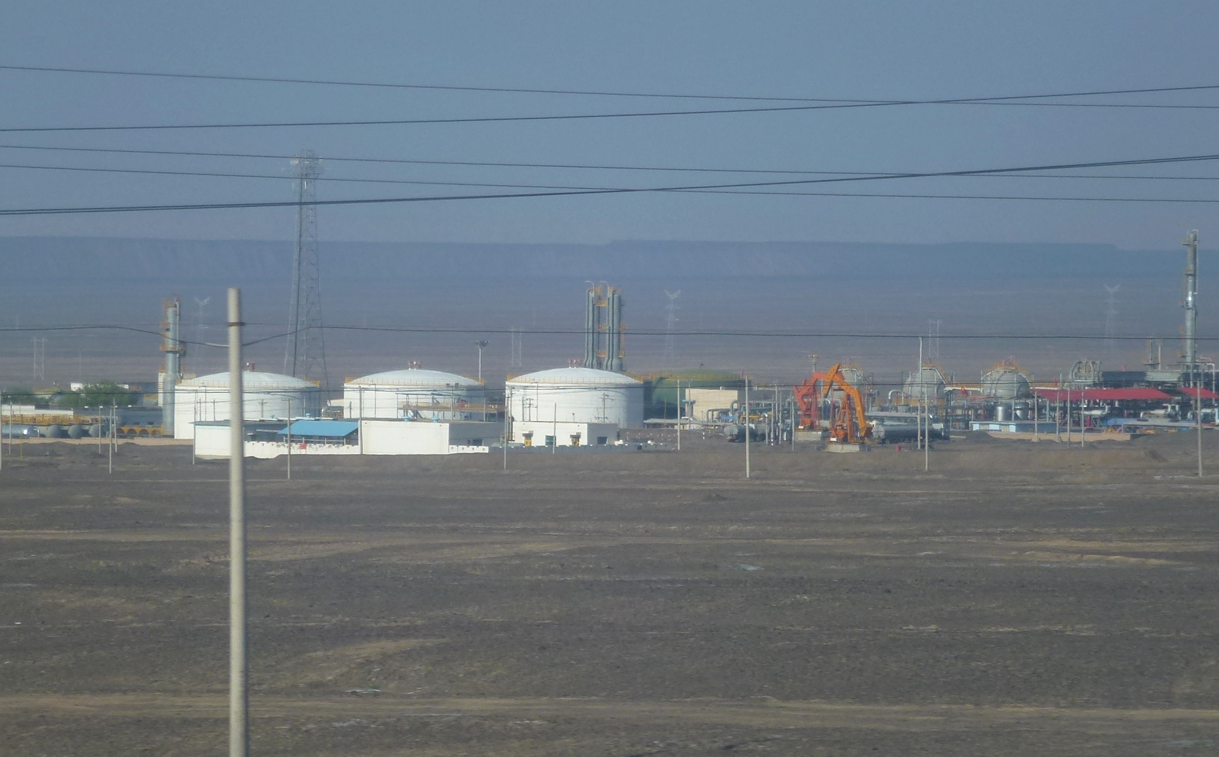 Extraction et exploitation du pétrole et de ses dérivés entre Liuyuan et Turfan, Xinjiang. 2012